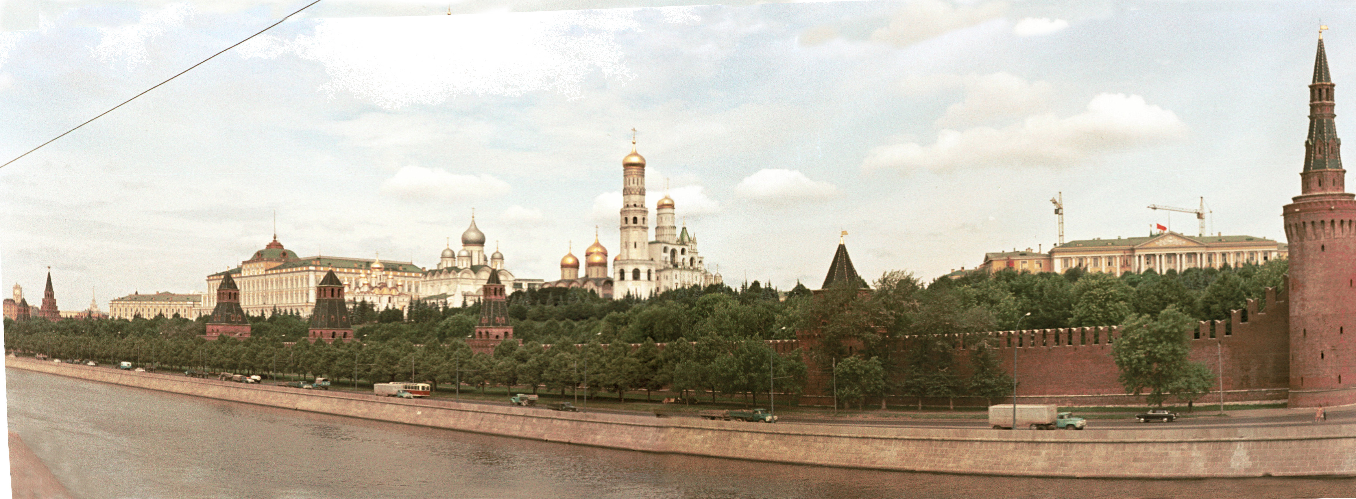 Quai du Kremlin, à Moscou